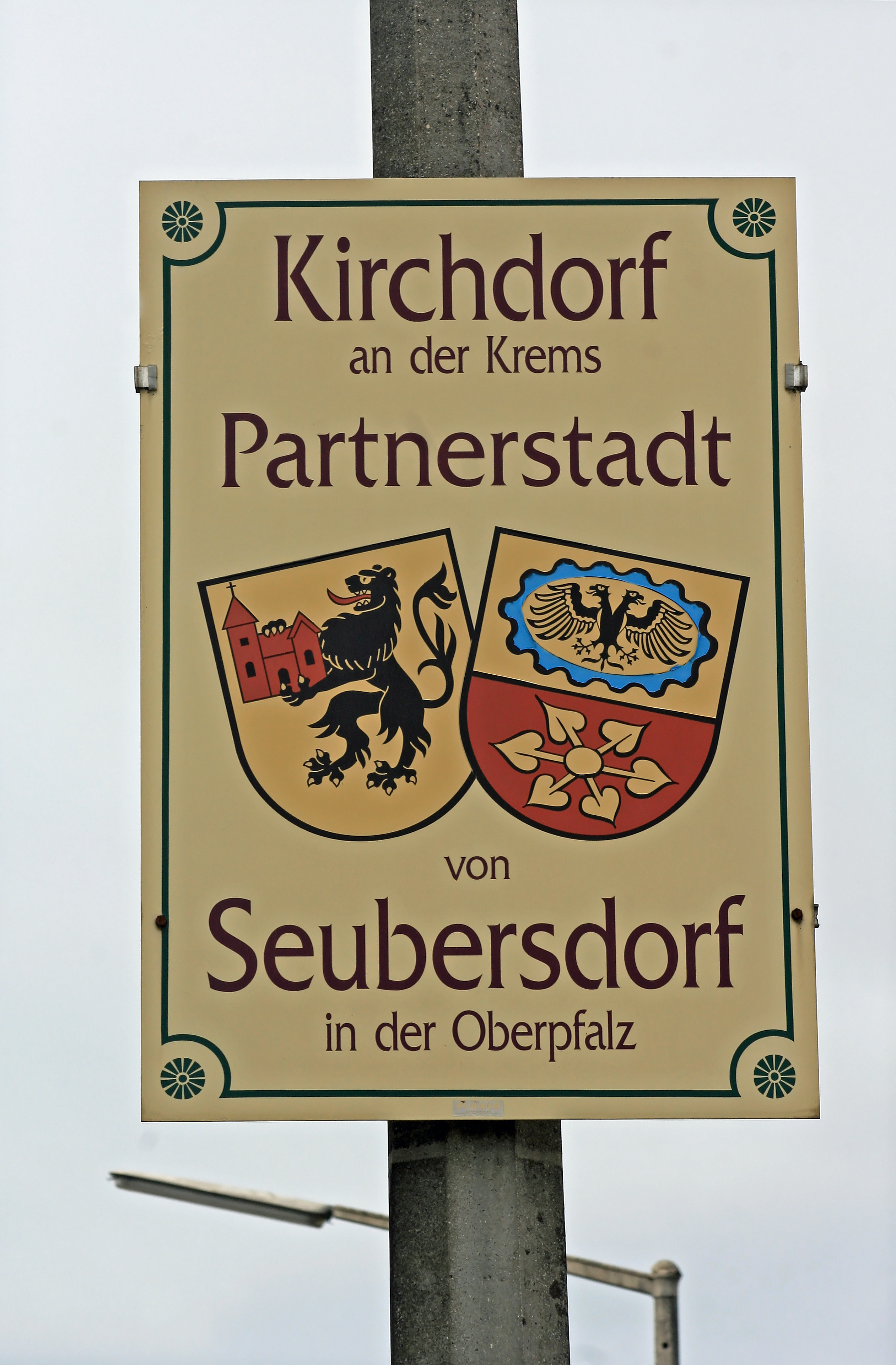 Schild an der Steiermärkerstraße in Kirchdorf an der Krems